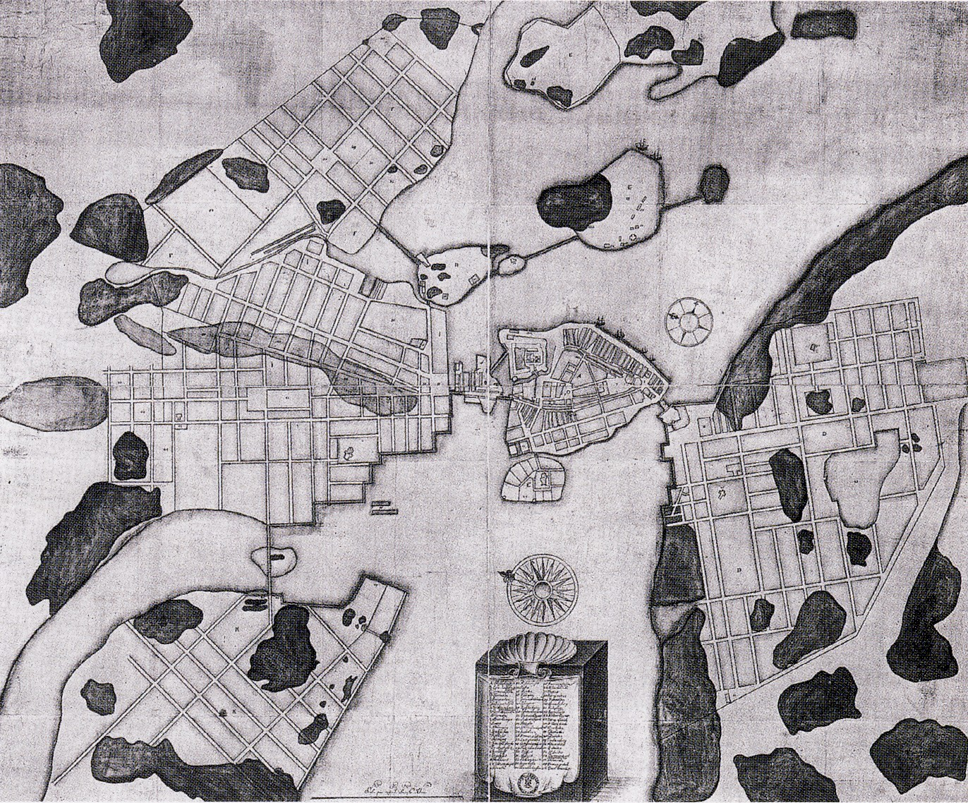 Flemings stadsplan för Stockholm på 1600-talet. Norr är till vänster